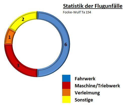 Statistik der Flugunfälle der Focke-Wulf Ta 154